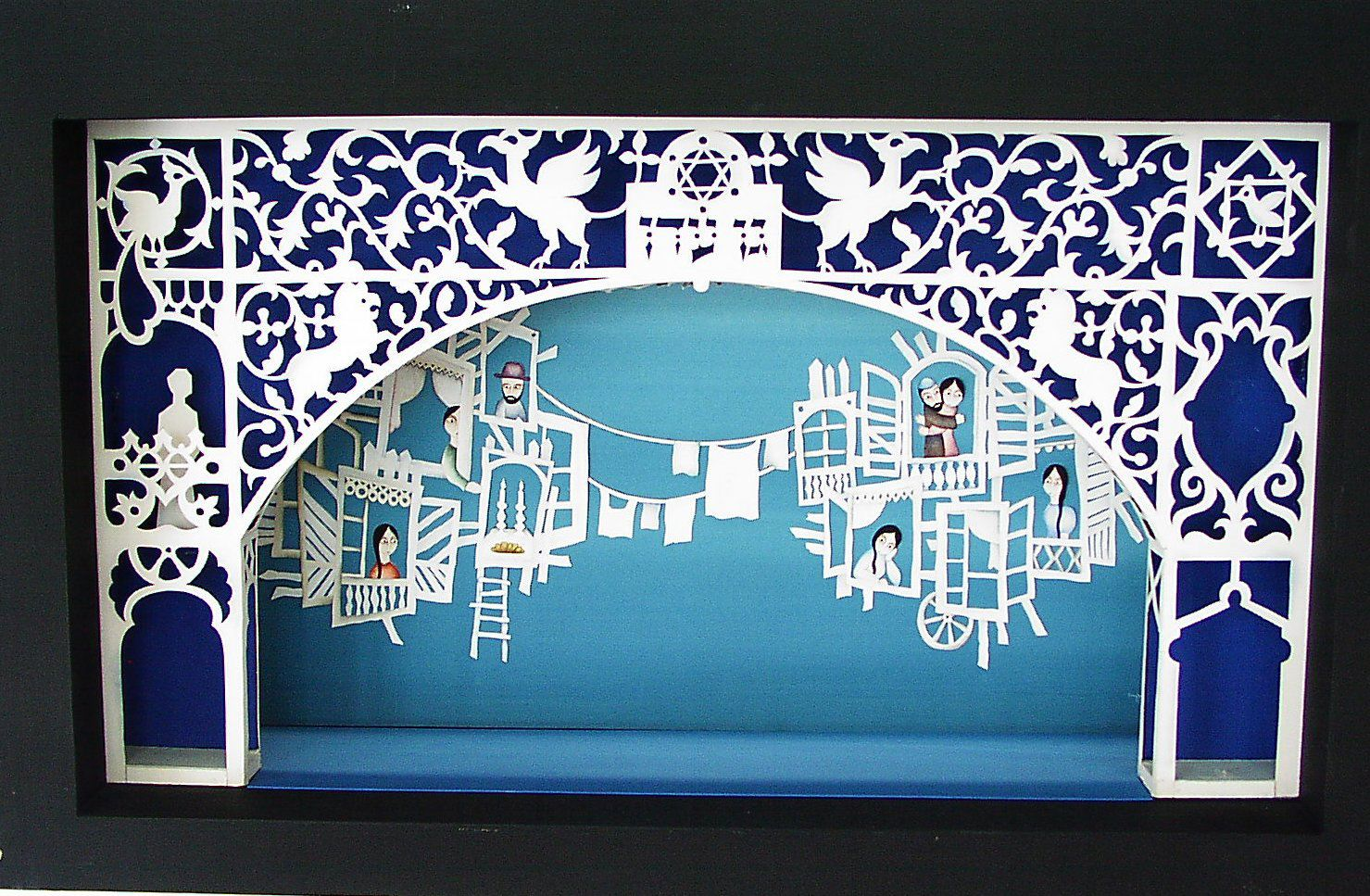 ספור גן עדן